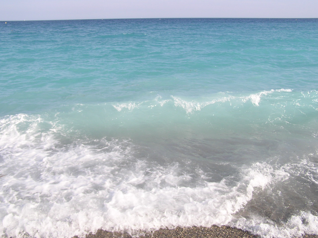 Côte d'Azur in Nice, June 2004. Filip Maljkovic